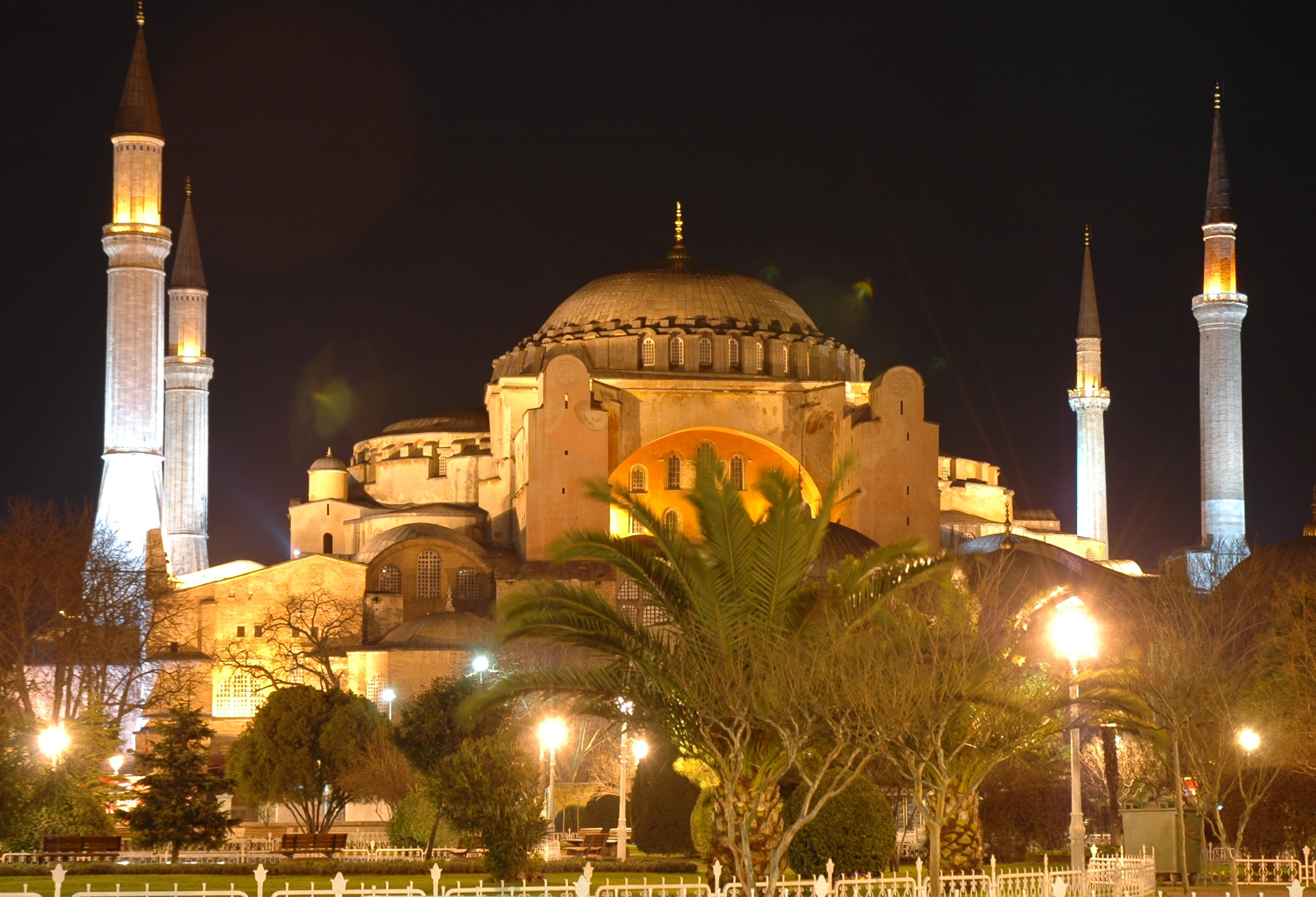 Istanbul - Santa Sofia de nit